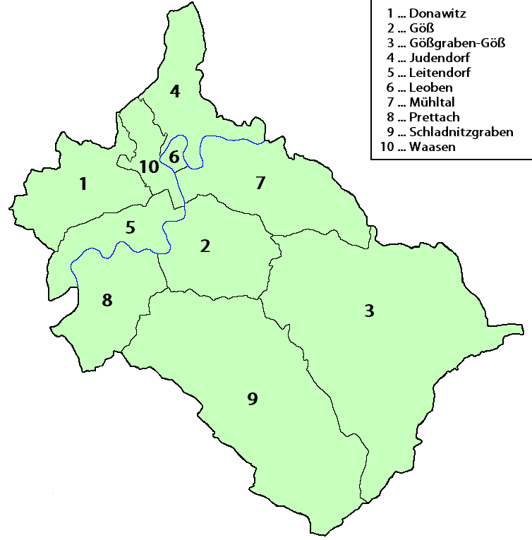 Karte mit den zehn Katastralgemeinden von Leoben